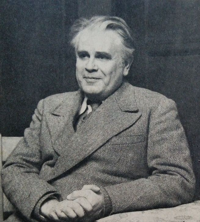 レジナルド・ブライス